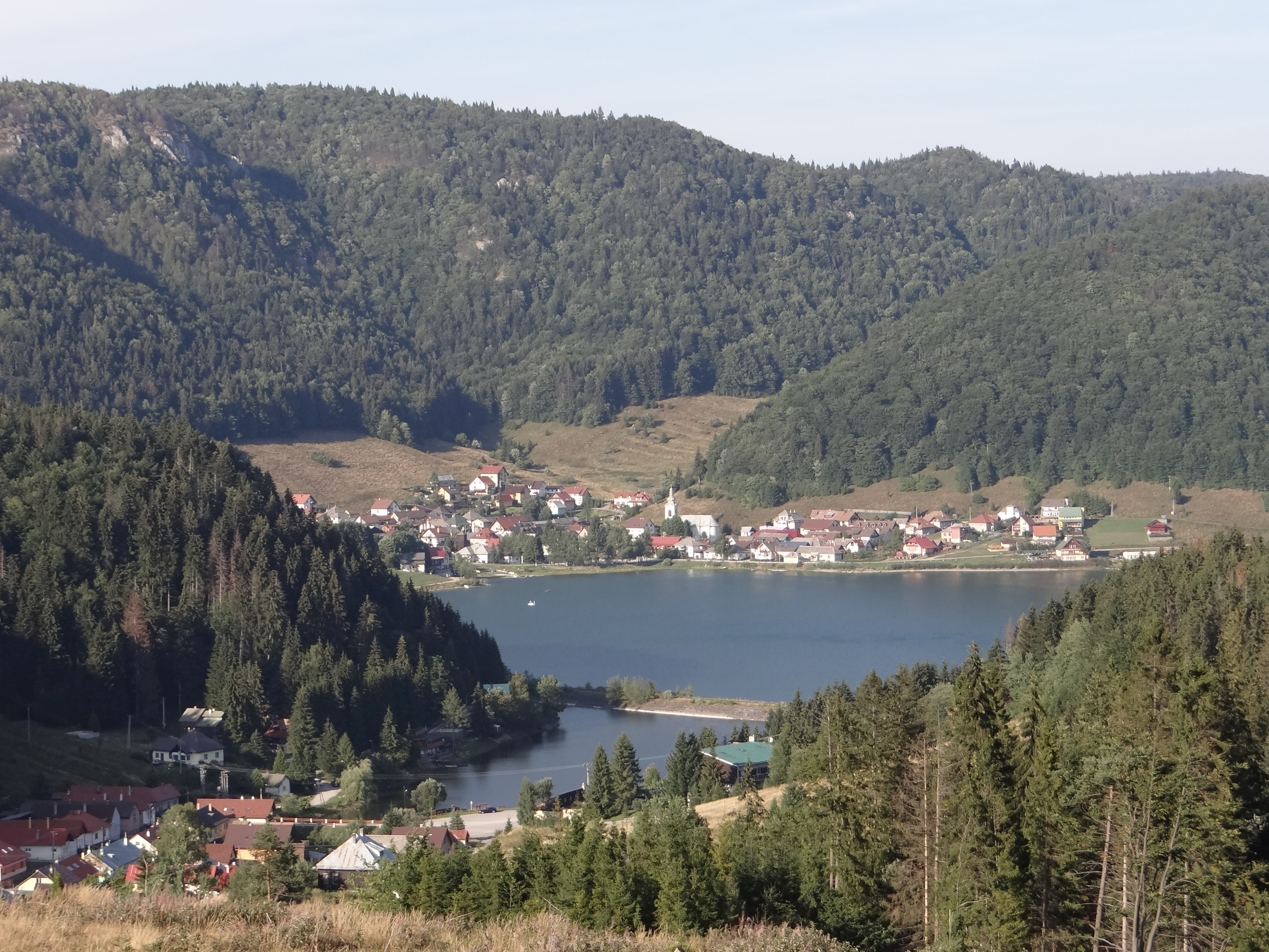 Dedinky